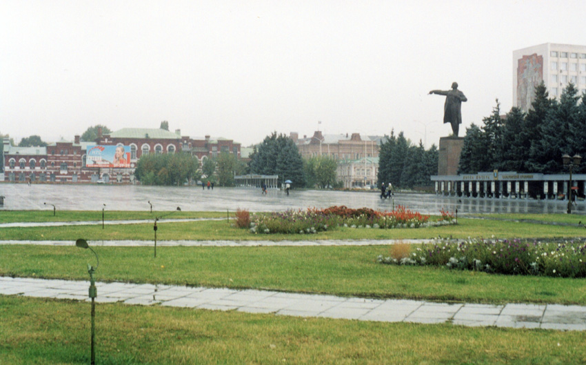 Саратов. Театральная площадь